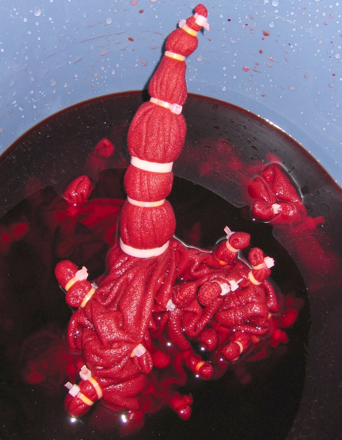 Bildbeschreibung: Batik Quelle: eigene Aufnahme Fotograf: selbst fotografiert von Johann H. Addicks Genehmigung: GFDL, kein wie auch immer geartetes "Gentlemen-Agreement". Bildnutzung ohne Einhaltung der Bestimmungen der GFDL ist kostenpflichtig und wird vom Rechteinhaber in Rechnung gestellt. Zweitlizensierung auf Anfrage. Es gelten die AGB. Datum